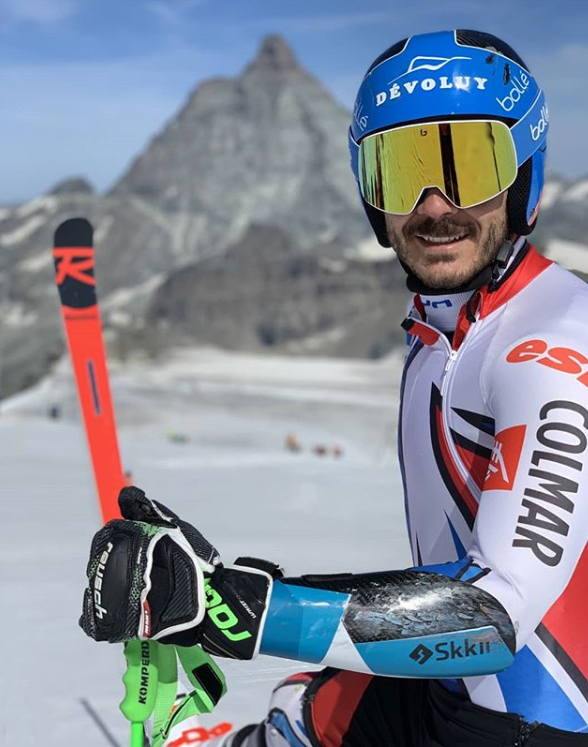 Cyprien Sarrazin devant le Cervin